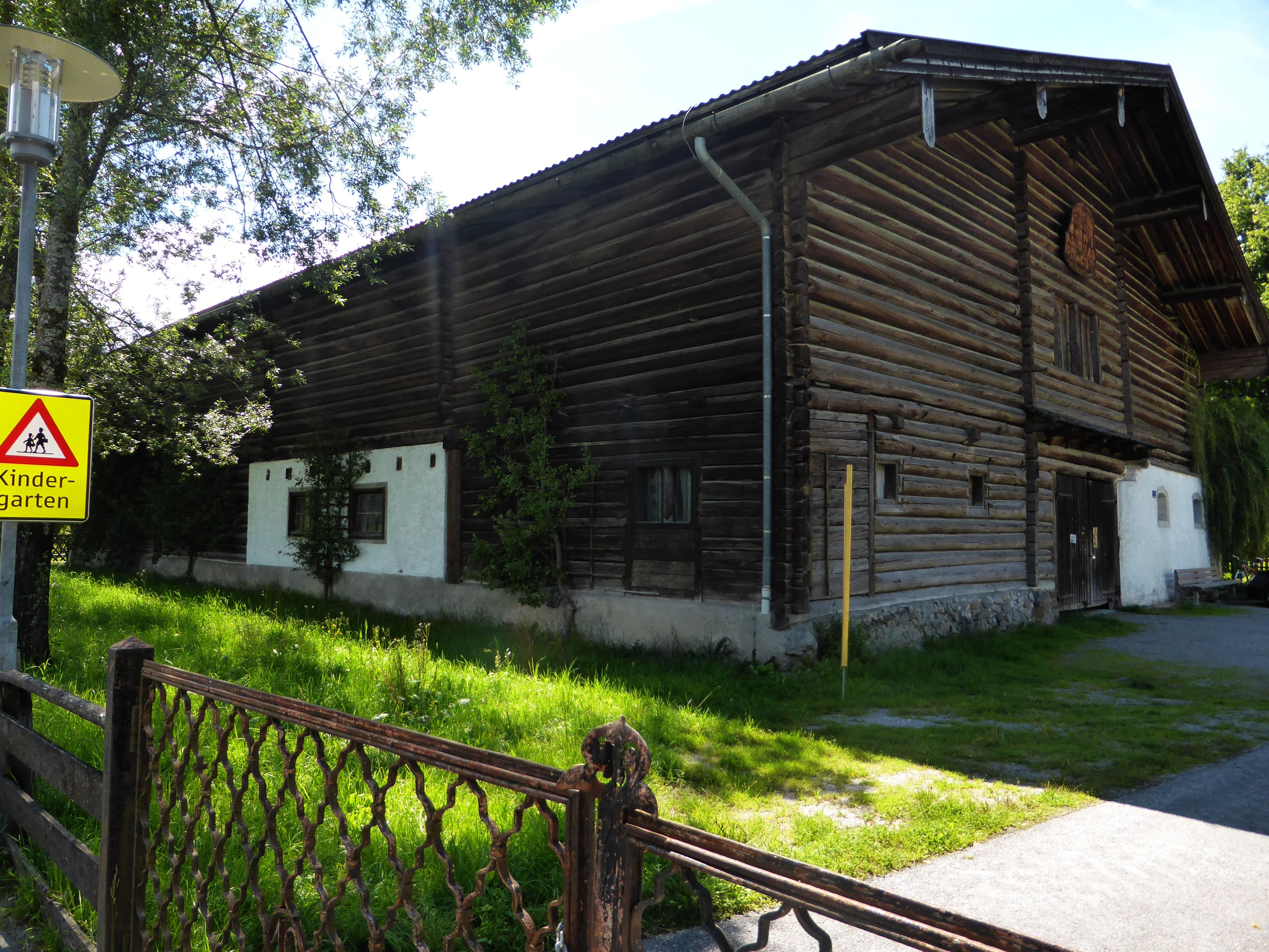 Dechantshofstall